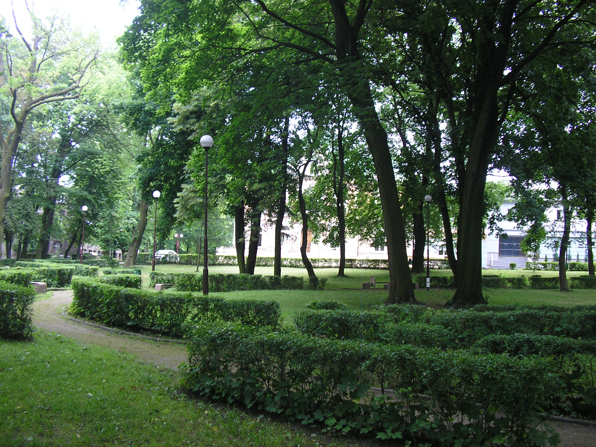 Park przy willi dyrektora huty. Częstochowa, ul. Łukasińskiego 42/48.